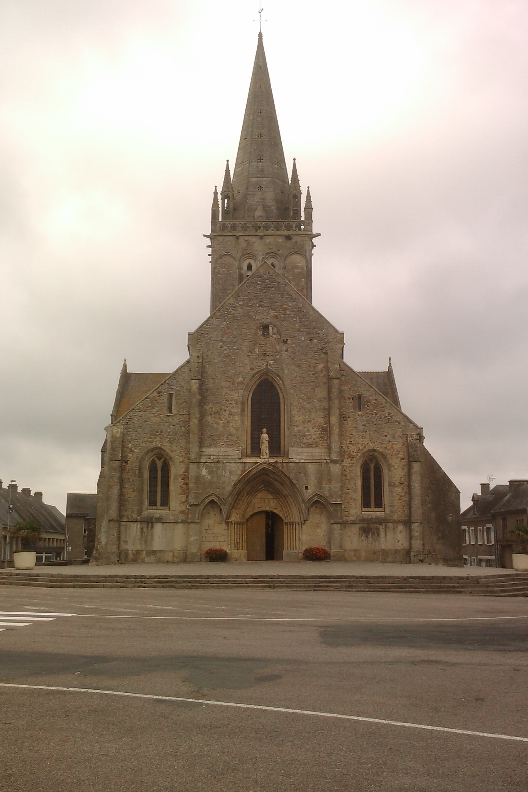 Église Saint-Jacques de Montebourg